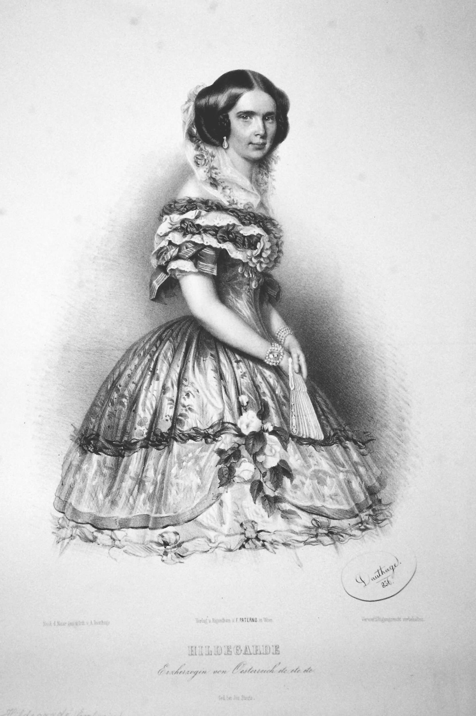 Hildegard Luise von Bayern (1825-1864), Erzherzogin von Österreich